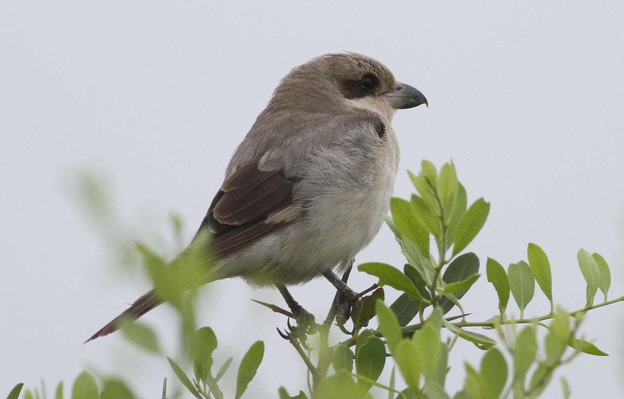 Lesser Grey Shrike, Lanius minor - juvenile - at Kruger Park